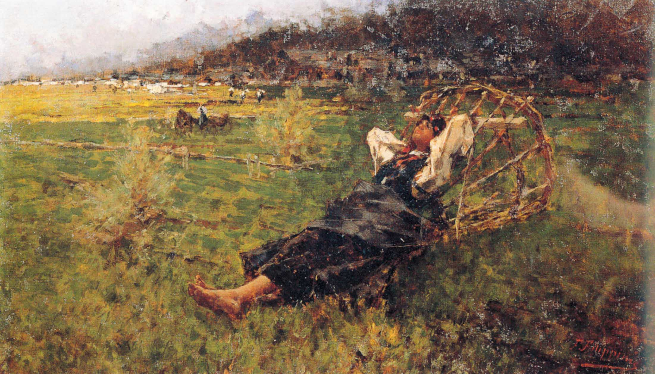 Francesco Filippini. Contadinella a riposo (1892-1893)